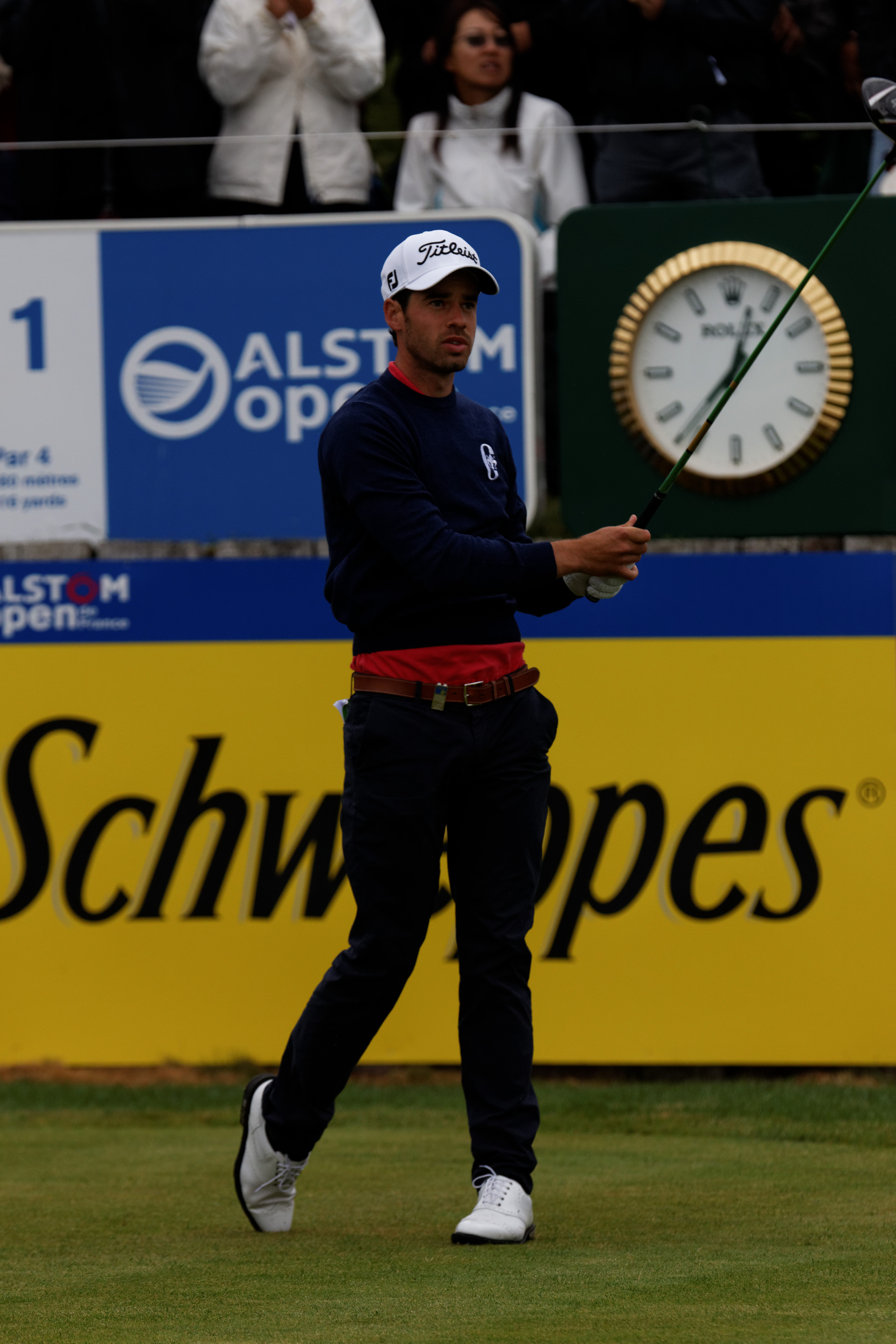 Victor Riu lors du quatrième tour de l'Open de France 2014 - Golf National - Saint-Quentin-en-Yvelines (78) - départ du trou n° 1